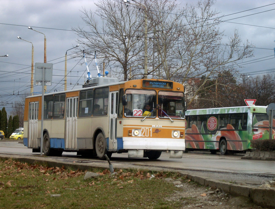 тролейбус